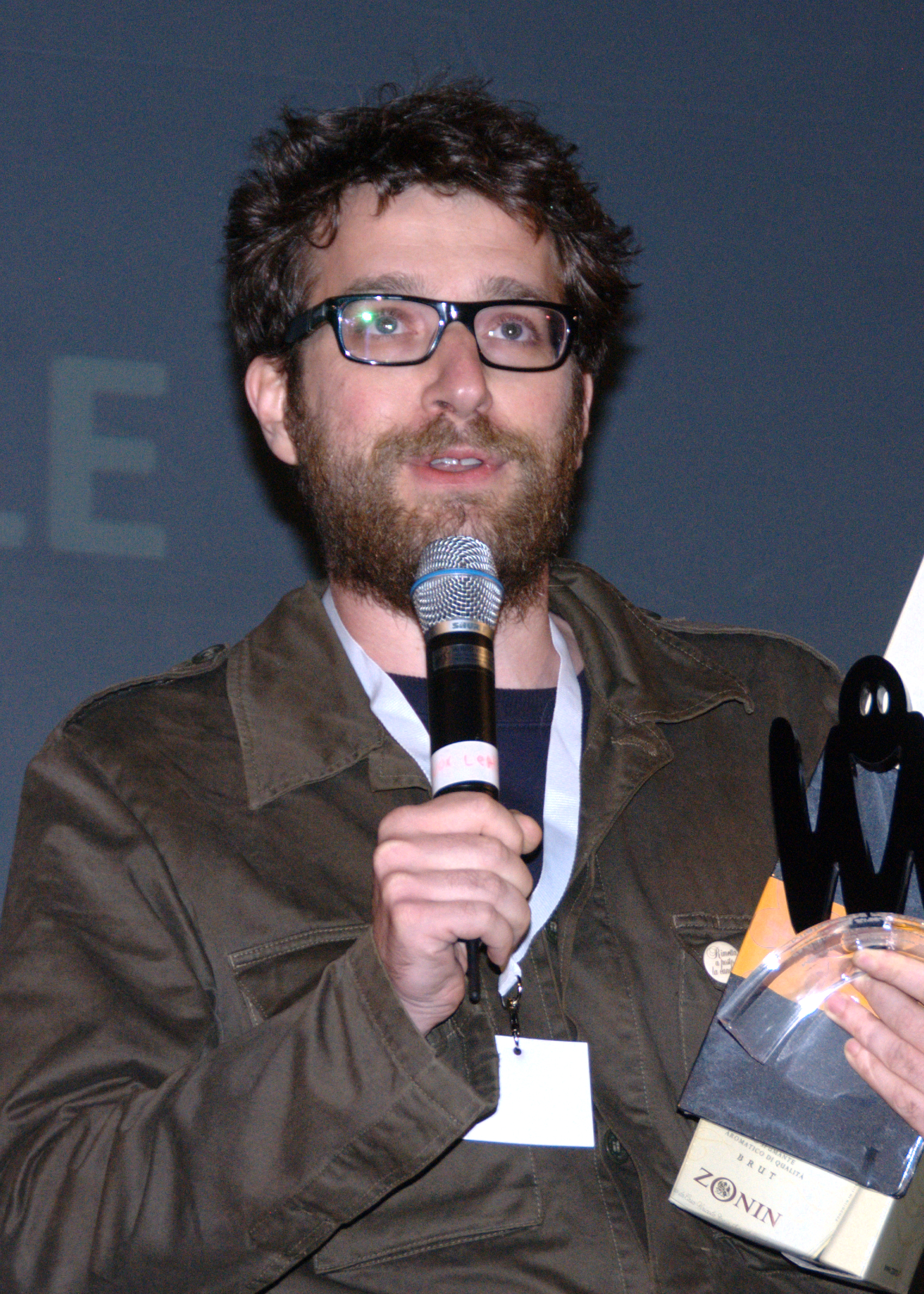 Matteo Bordone al Blogfest 2010. Bordone ha vinto il premio come migliore blog personale ai Macchianera Blog Awards per Freddy Nietsche.